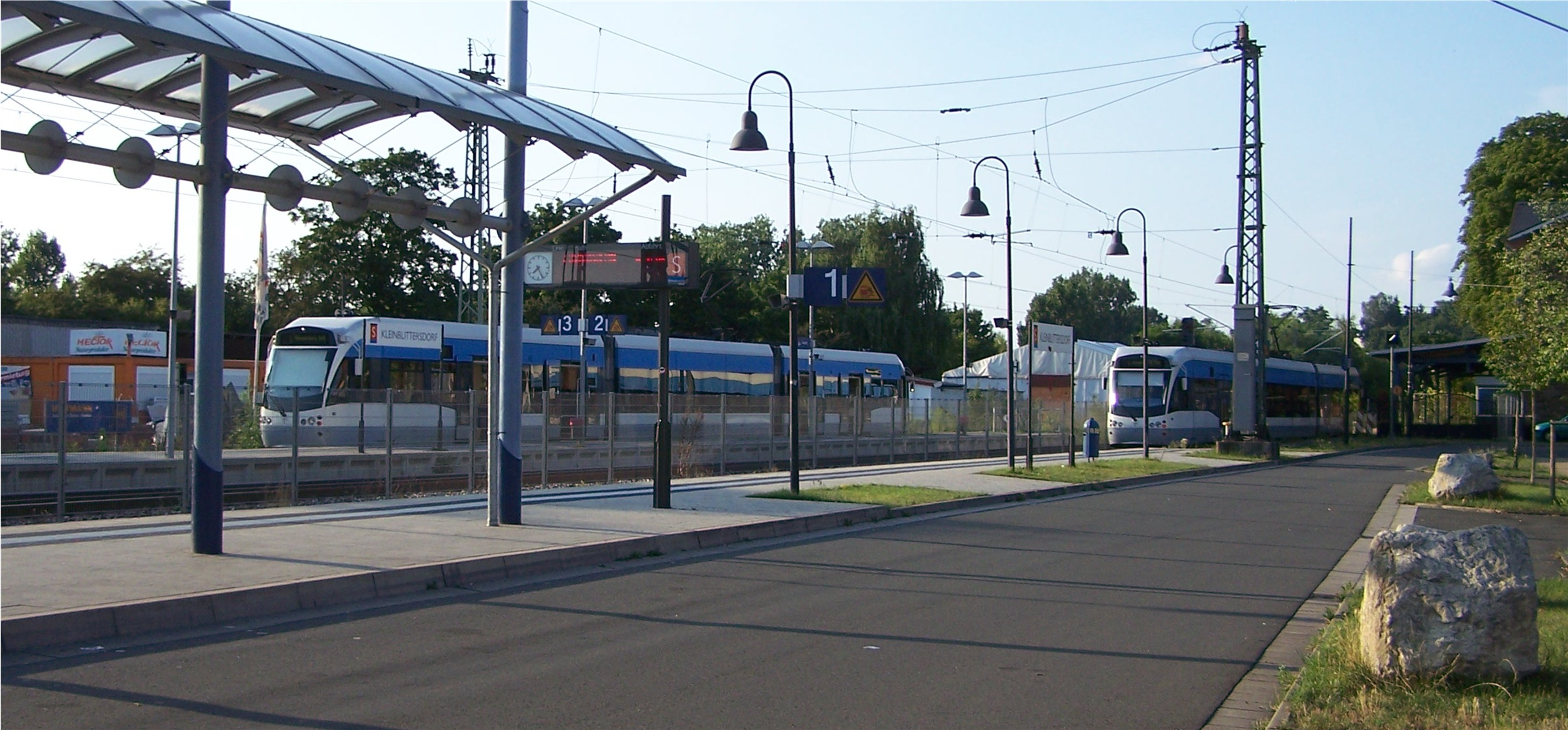 Bahnhof Kleinblittersdorf: eine Stadtbahn auf Gleis 1 (im Vordergrund) verlässt die Station Richtung Saarbrücken-Riegelsberg Süd, eine weitere Bahn steht auf Gleis 3 bereit, um in 15 Min. in die gleiche Richtung aufzubrechen.